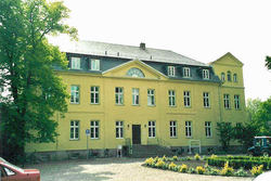 Herrenhaus Kläden, in der Nähe von Stendal (Sachsen-Anhalt). Das ursprüngliche Herrenhaus brannte 1751 ab. In den nachfolgenden drei Jahren wurde es wieder aufgebaut, rund um das Schloss wurde ein Park im Stile des Barock angelegt. Anfangs errichtete man das Schloss lediglich einstöckig, es wurde 1827 allerdings um einen Stock erweitert. Die Unterschiede dieser beiden Stockwerke sind noch heute, vor allem im Innern, sichtbar. Vor dem Zweiten Weltkrieg gehörte es dem Grafen von Bassewitz-Levetzow, der dort ein Staatszuchtunternehmen leitete. Nach 1945 wurde das Gut aufgeteilt, das Schloss wurde als "Haus der Werktätigen" weitergeführt. Von 1995 bis 2005 war das Schloss Kläden Sitz der Verwaltungsgemeinschaft. Seitdem wird es als Seniorenwohnheim genutzt.